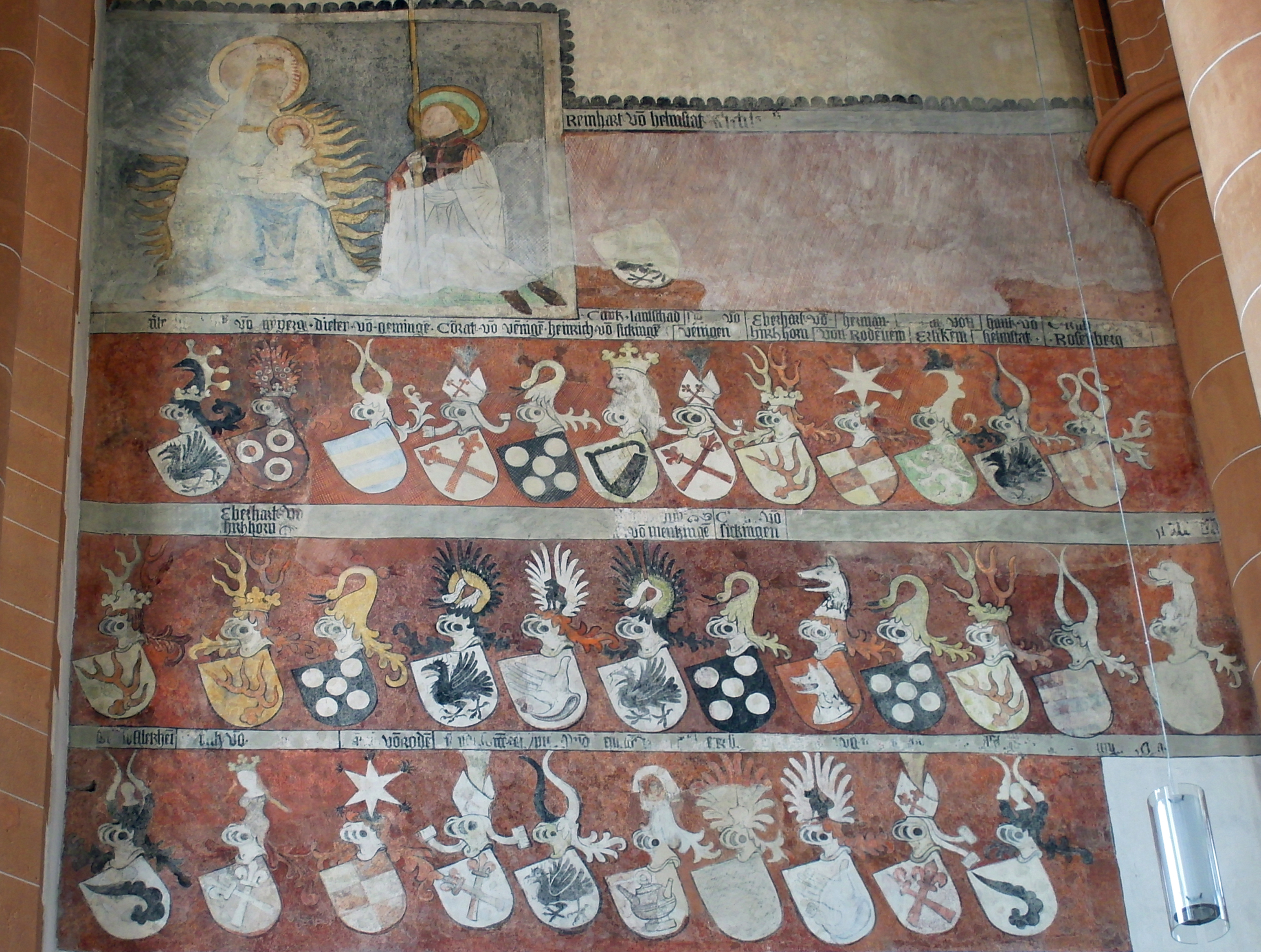 Heiliggeistkirche Heidelberg Wappen der Gesellschaft mit dem Esel 1. Reihe: Muttergottes und St. Georg, Reinhart von Helmstat(t) 2. Reihe: Göler von Ravensburg ?, Neipperg, Dieter von Gem(m)ingen, Conrat von Venni(n)gen, Heinrich von Sickingen, Landschad von Steinach, Hans ? von Venni(n)gen, Eberhard von Hirschhorn, Herman von Rodenstein, Erligheim, Hanß von Helmstat(t), Rosenberg 3. Reihe: Hirschhorn, Eberhart von Hirschhorn, Sickingen, Mentzingen, Handschuhsheim, Mentzingen, Sickingen, Rüdt von Collenberg, Sickingen, Hirschhorn, Gemmingen, Auerbach oder Heusenstamm ? 4. Reihe: Adelsheim, Remchingen, Rodenstein, Venningen, Helmstatt, Stettenberg, ?, Handschuhsheim, Venningen, Adelsheim